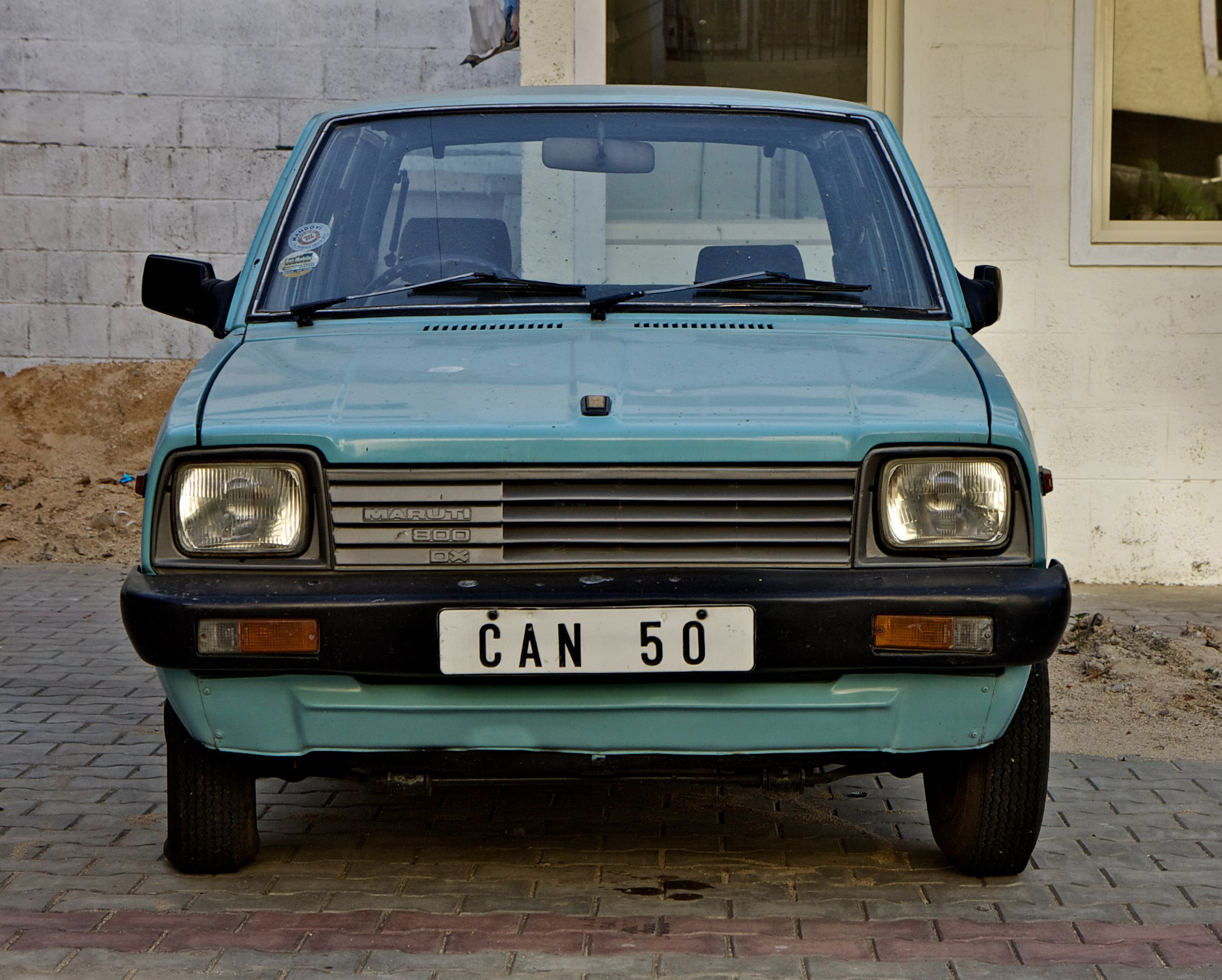 First generation Maruti 800 DX